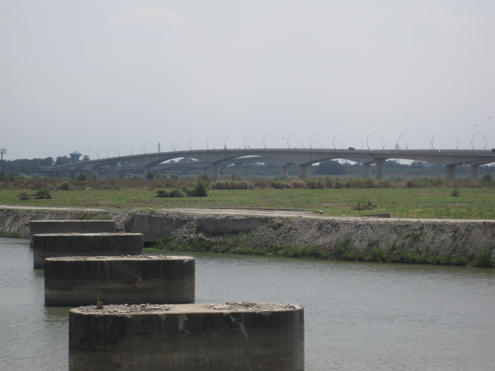 臺灣高屏大橋